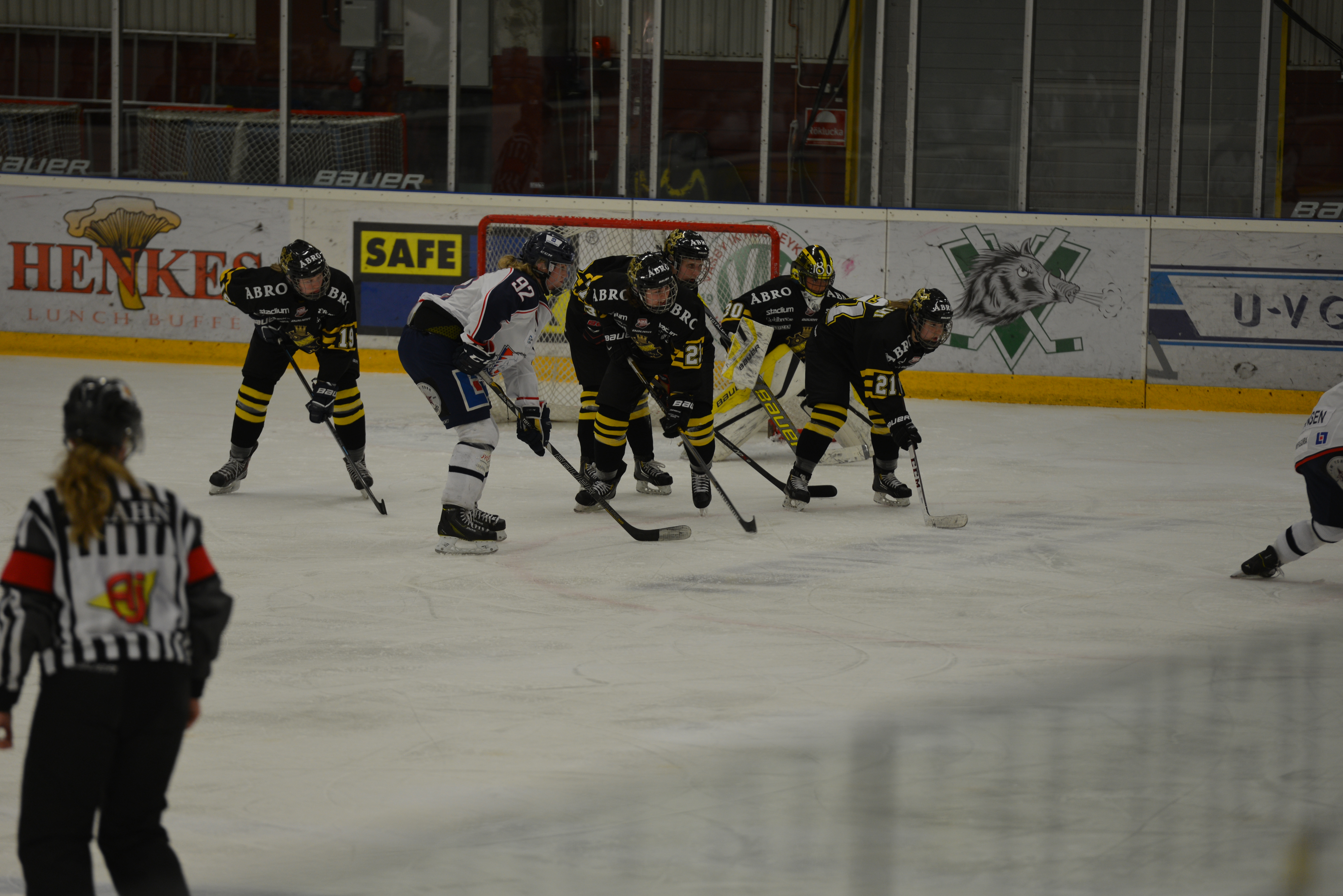 SM-final 1 i slutspelet i ishockey för damer säsongen 2014/2015 mellan AIK Ishockey Damer och Linköpings HC Dam. Matchen spelades i Vilundaparkens Ishall i Upplands Väsby och slutade 0-2. Matchfakta här.